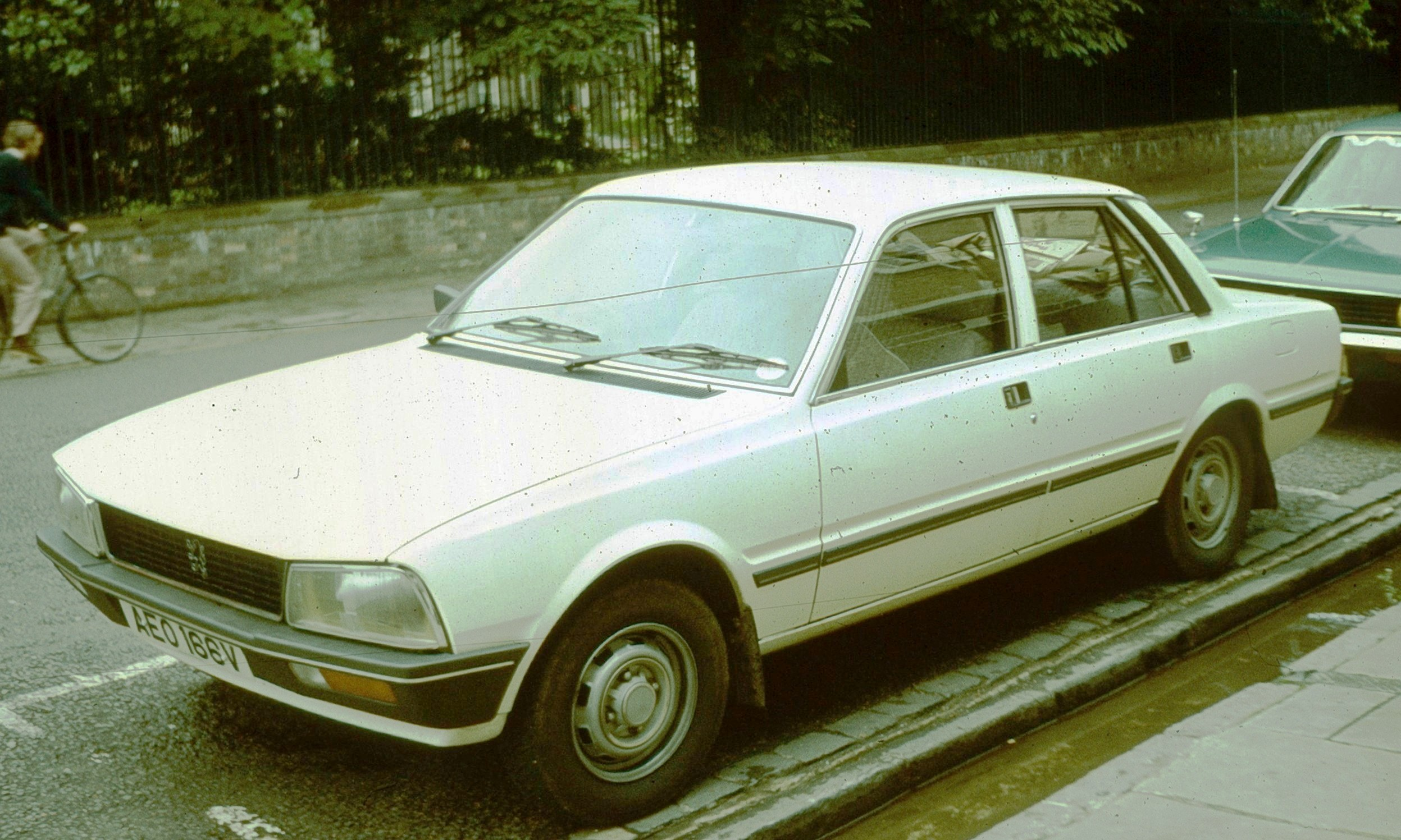 Peugeot 505 année modèle 1979 à 1982